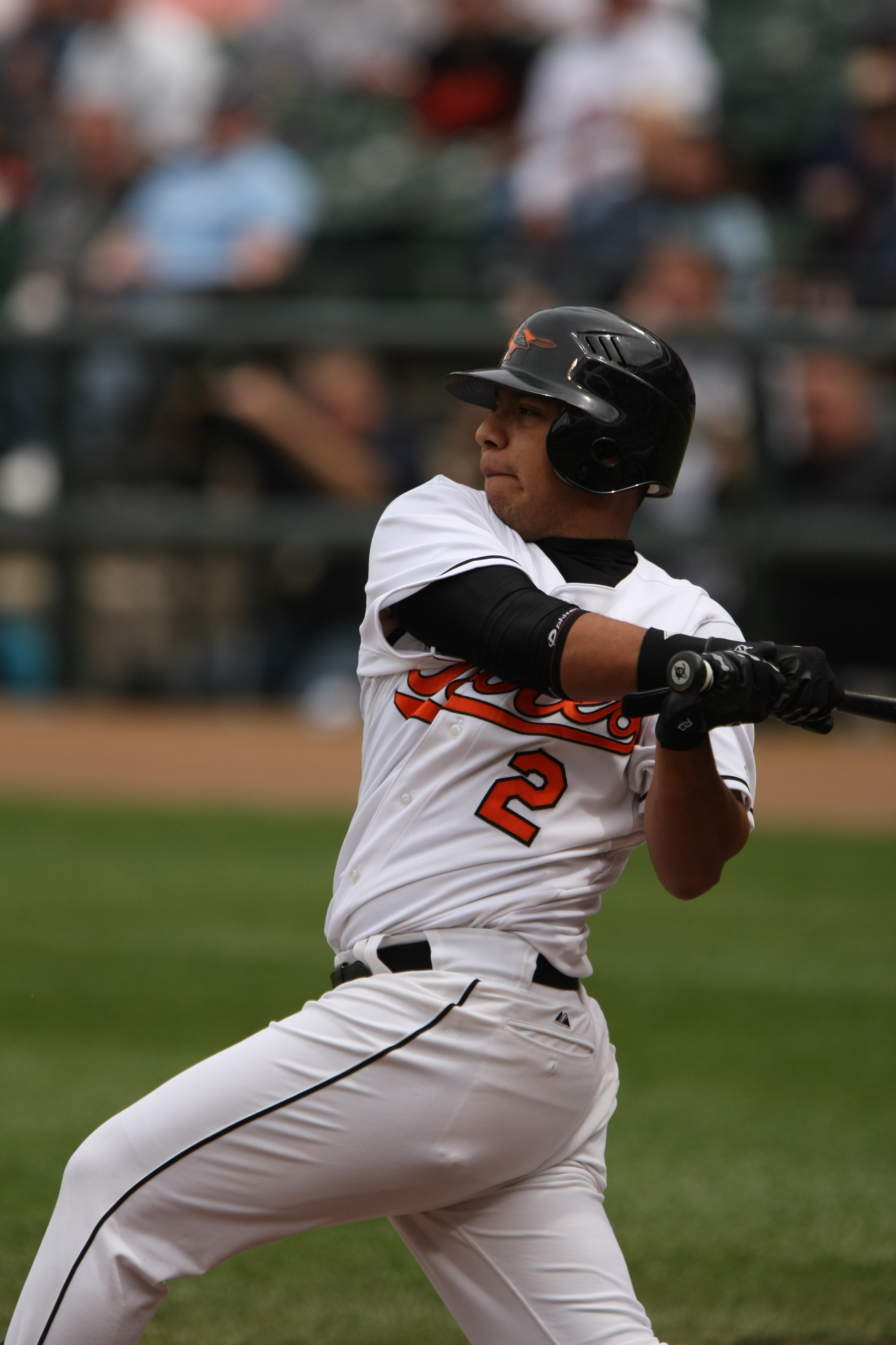 Luis Hernández